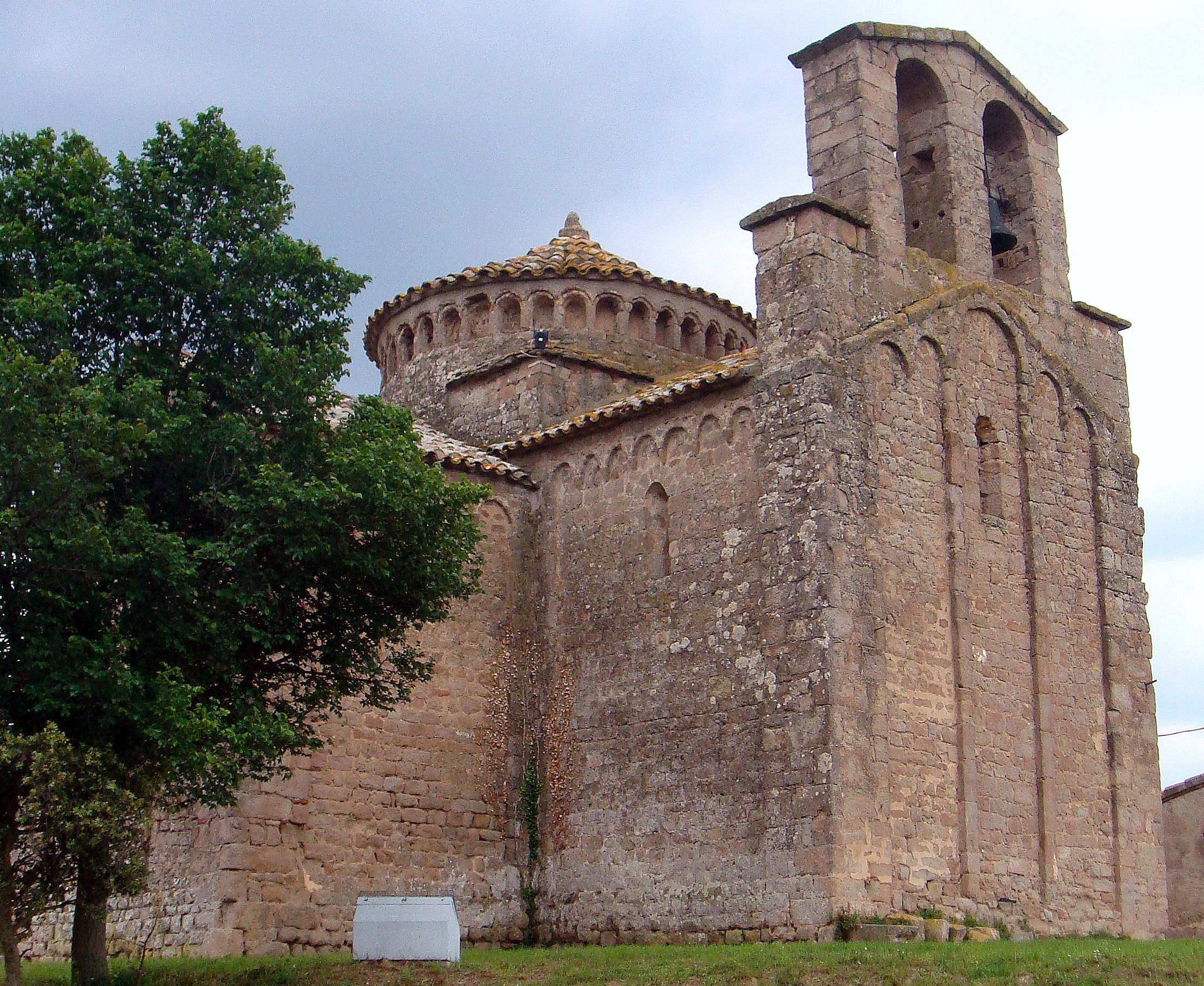 Imatge de l'església de Sant Cugat del Racó